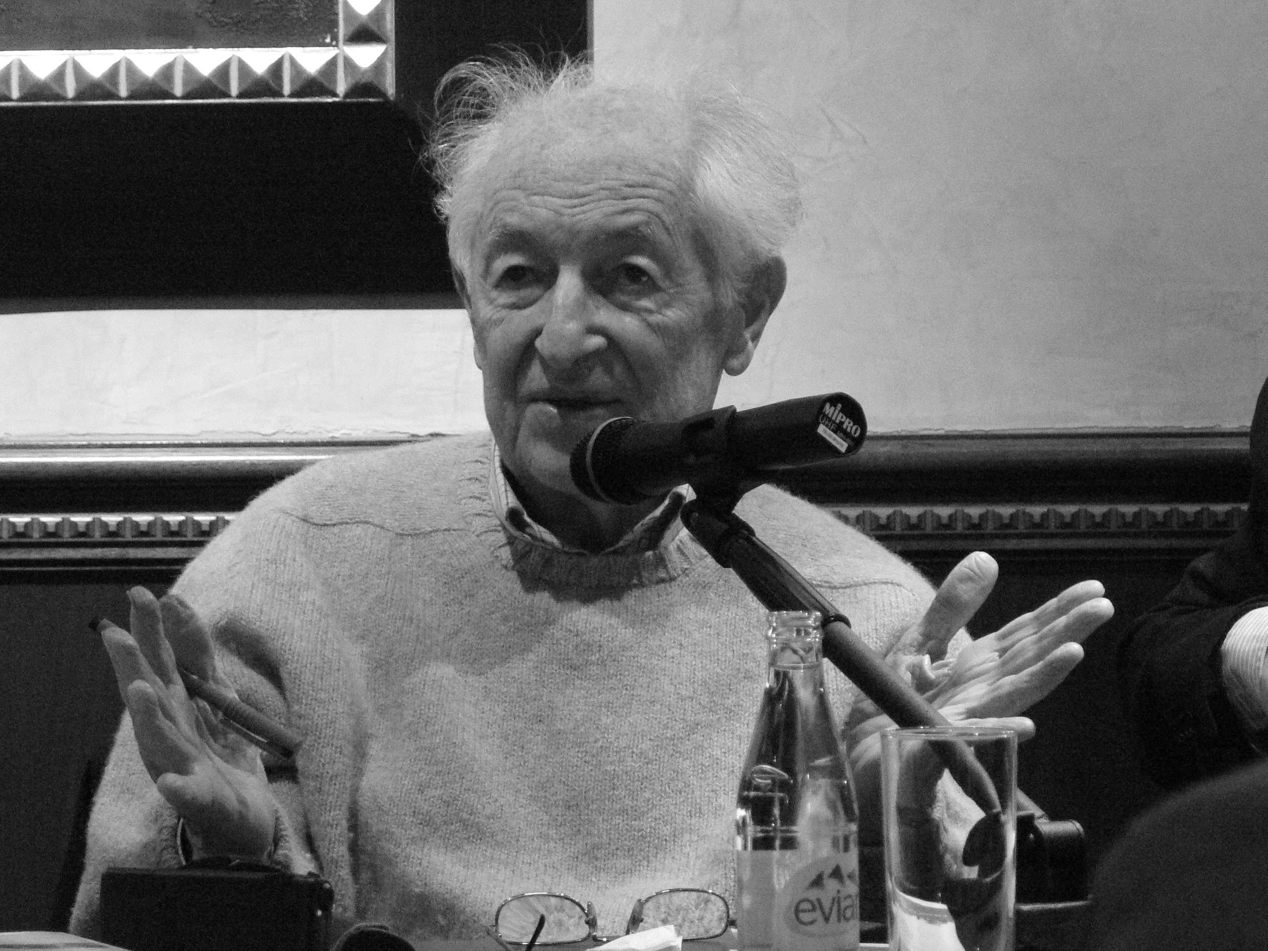 Rencontre avec Lorand Gaspar au café Littéraire "Le François Coppée"